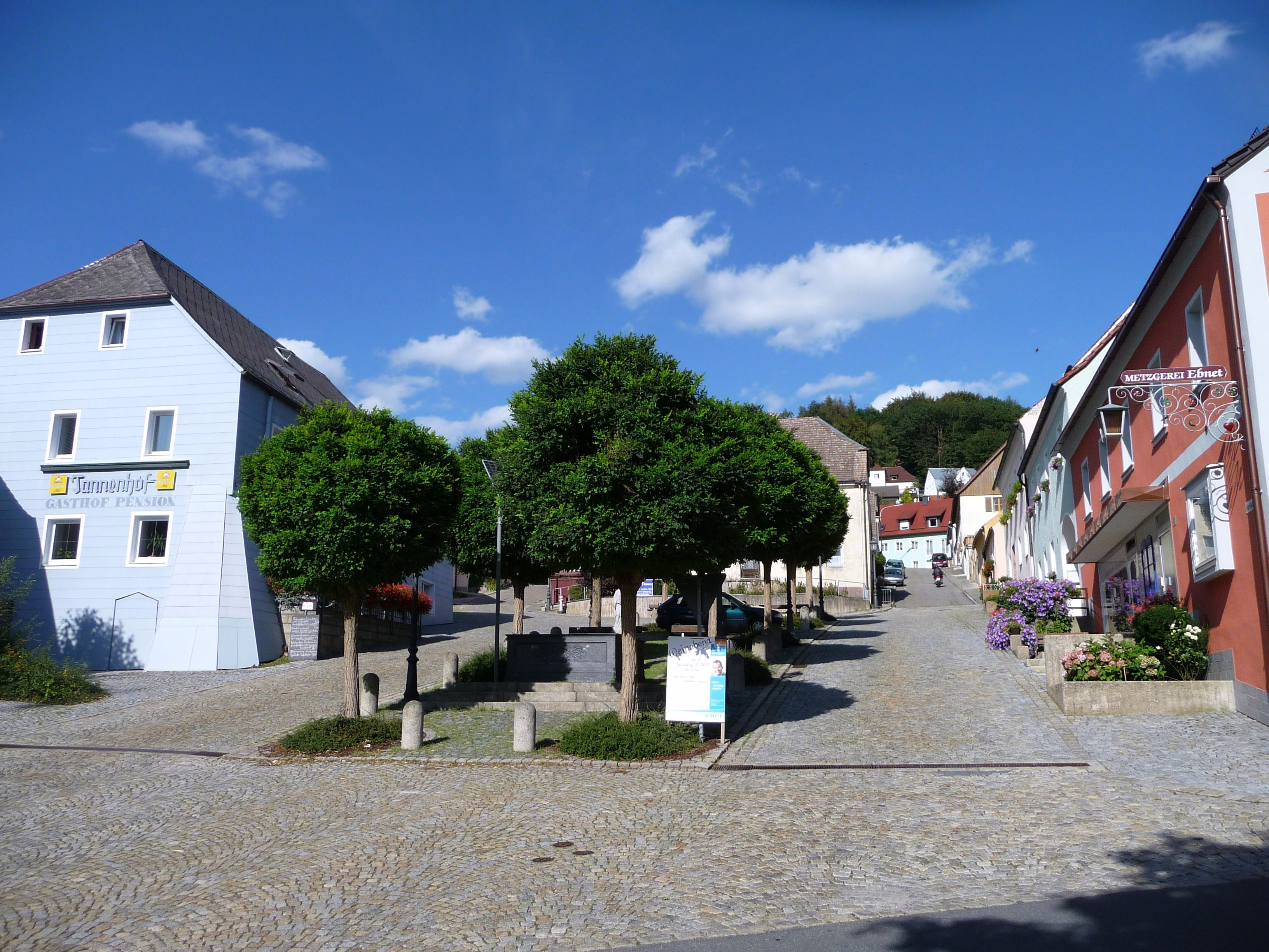 Der Marktplatz von Tännesberg mit Blick zum Schlossberg